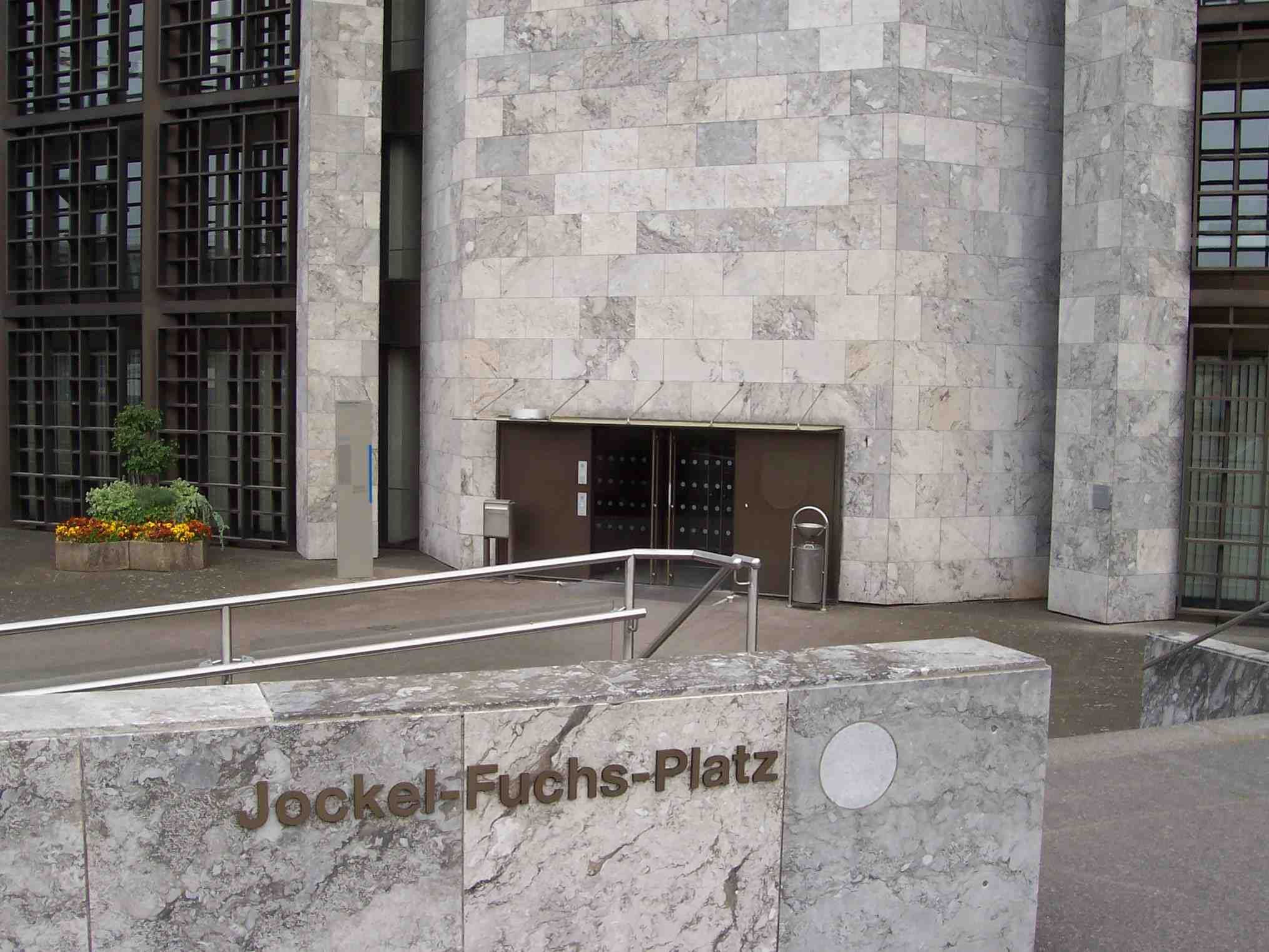 Jockel-Fuchs-Platz mit Eingang ins Rathaus von Mainz, welches von Arne Jacobsen entworfen wurde.